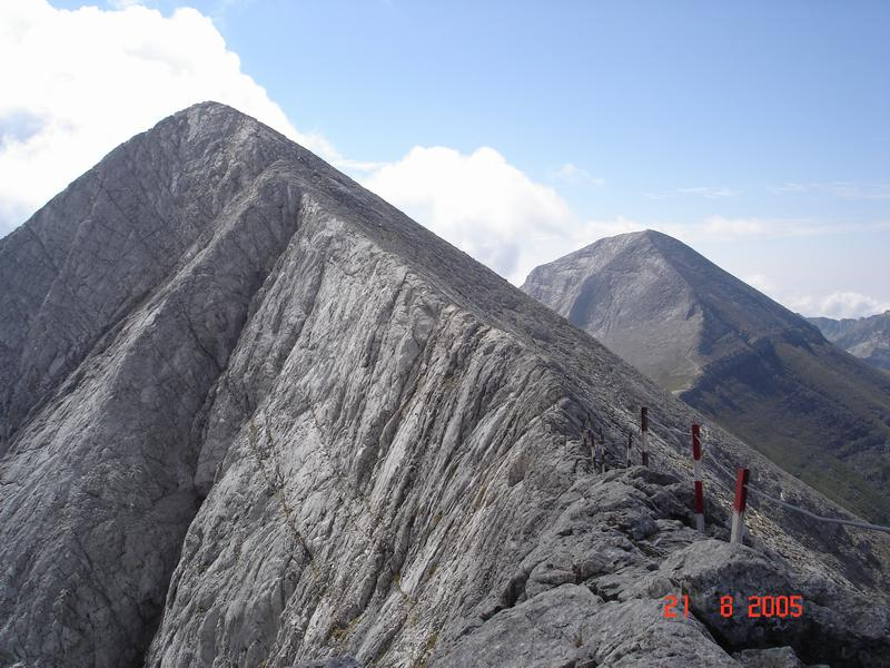 Pirin mountain in Bulgaria